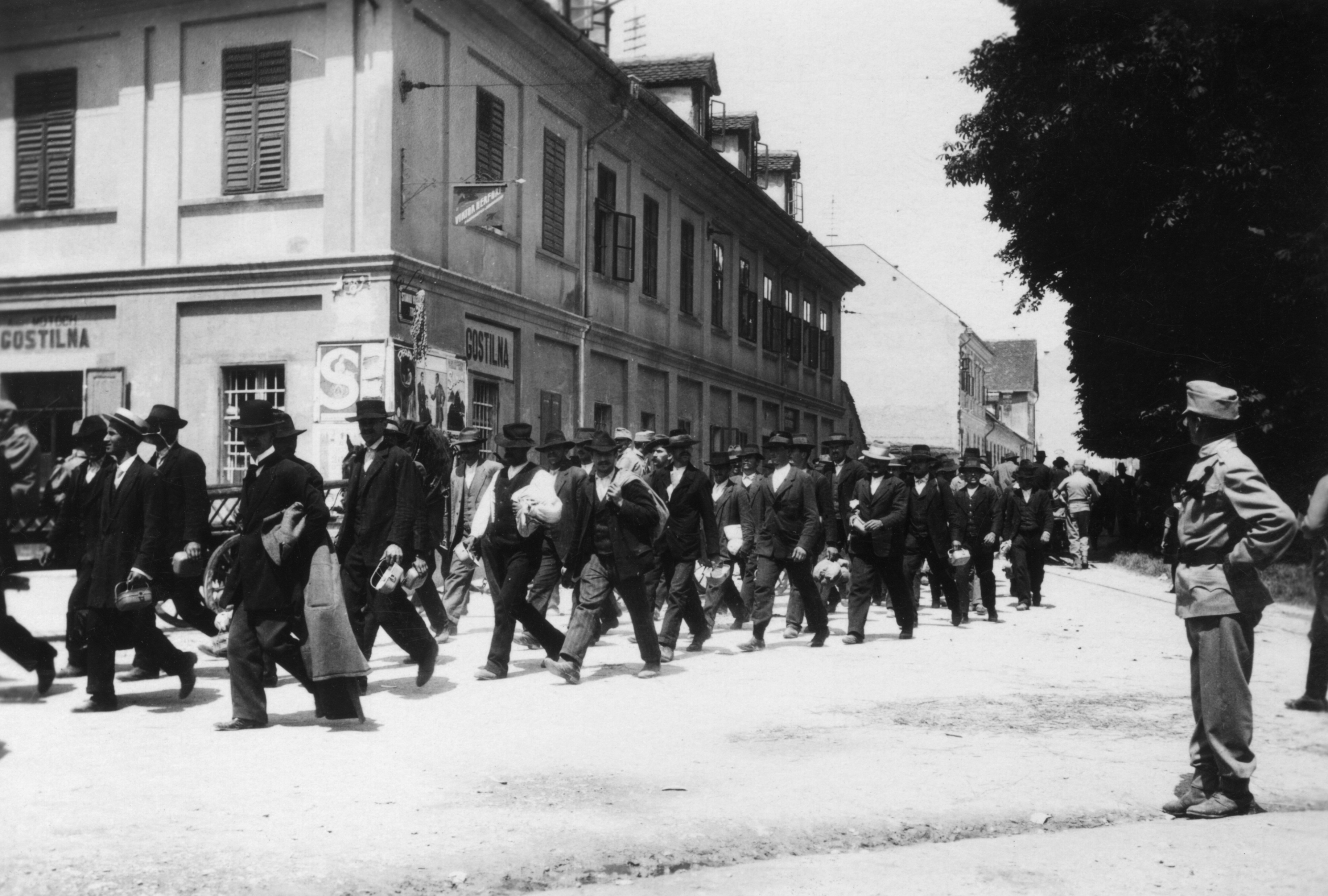 Kolona rezervistov v prvih dneh mobilizacije v Ljubljani.